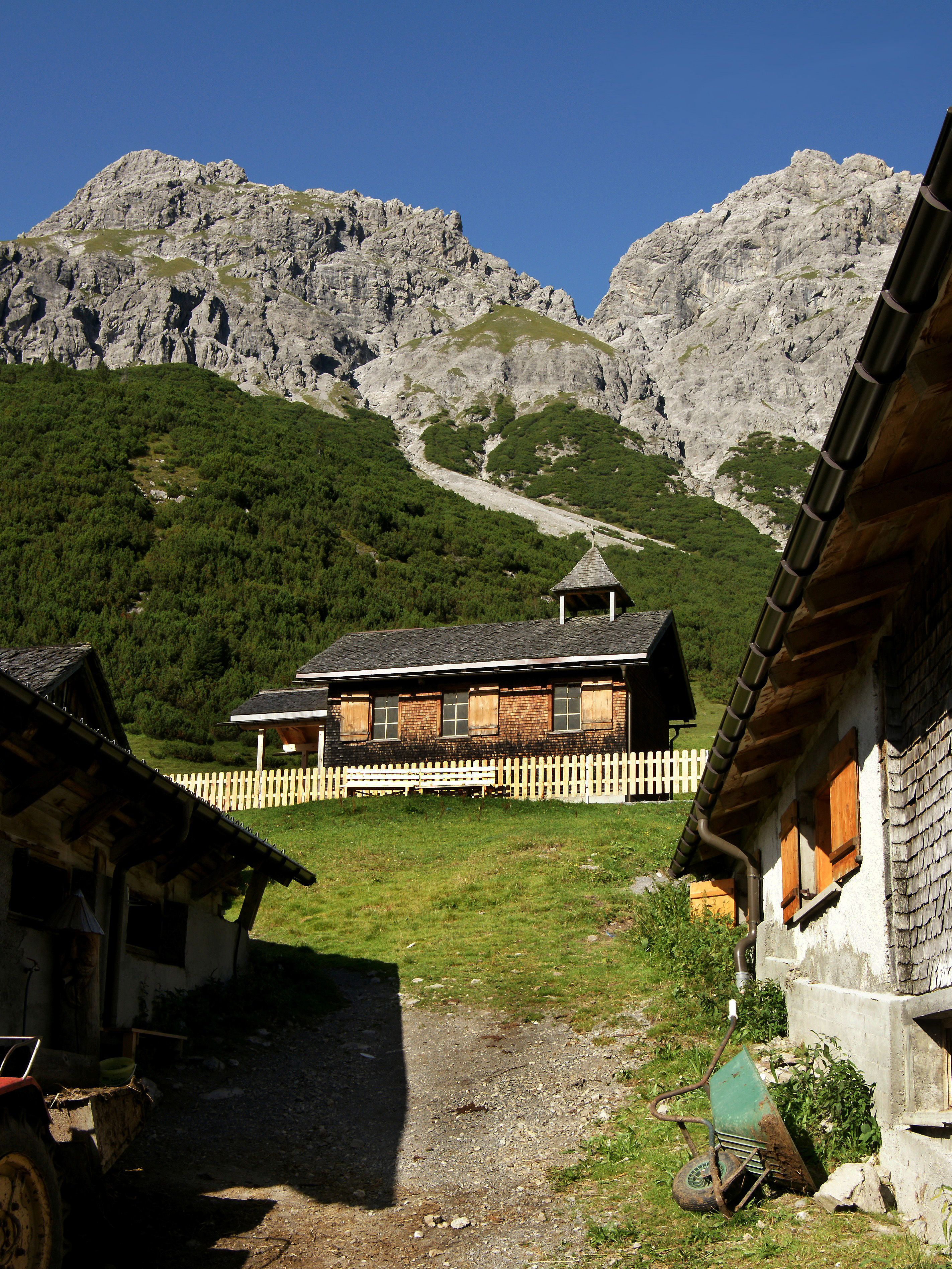 Im Jahre 1953 errichtete Pfarrer Josef Kary aus Deutschland einem Versprechen folgend auf der Alpe Klesenza eine Marienkapelle; das Patronatsfest wird jeweils am 15. August mit vielen Besuchern festlich gefeiert. Im Hintergrund erhebt sich die 2.272 Meter hohe Bettlerspitze im Gadnergschröf. Die Alpe Klesenza wird in den Sommermonaten vom Verkehrsverbund Vorarlberg VVV mit der Linie 77a von Buchboden befahren. Ansonsten besteht ein generelles Fahrverbot.